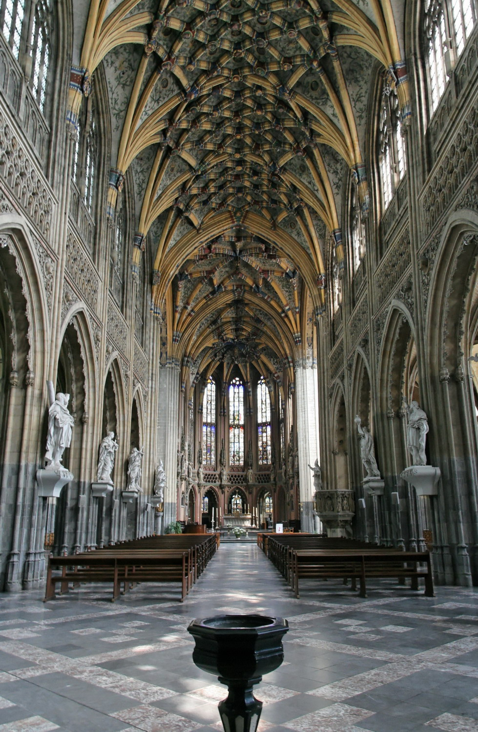 Saint-Jacques church - Liège, Belgium